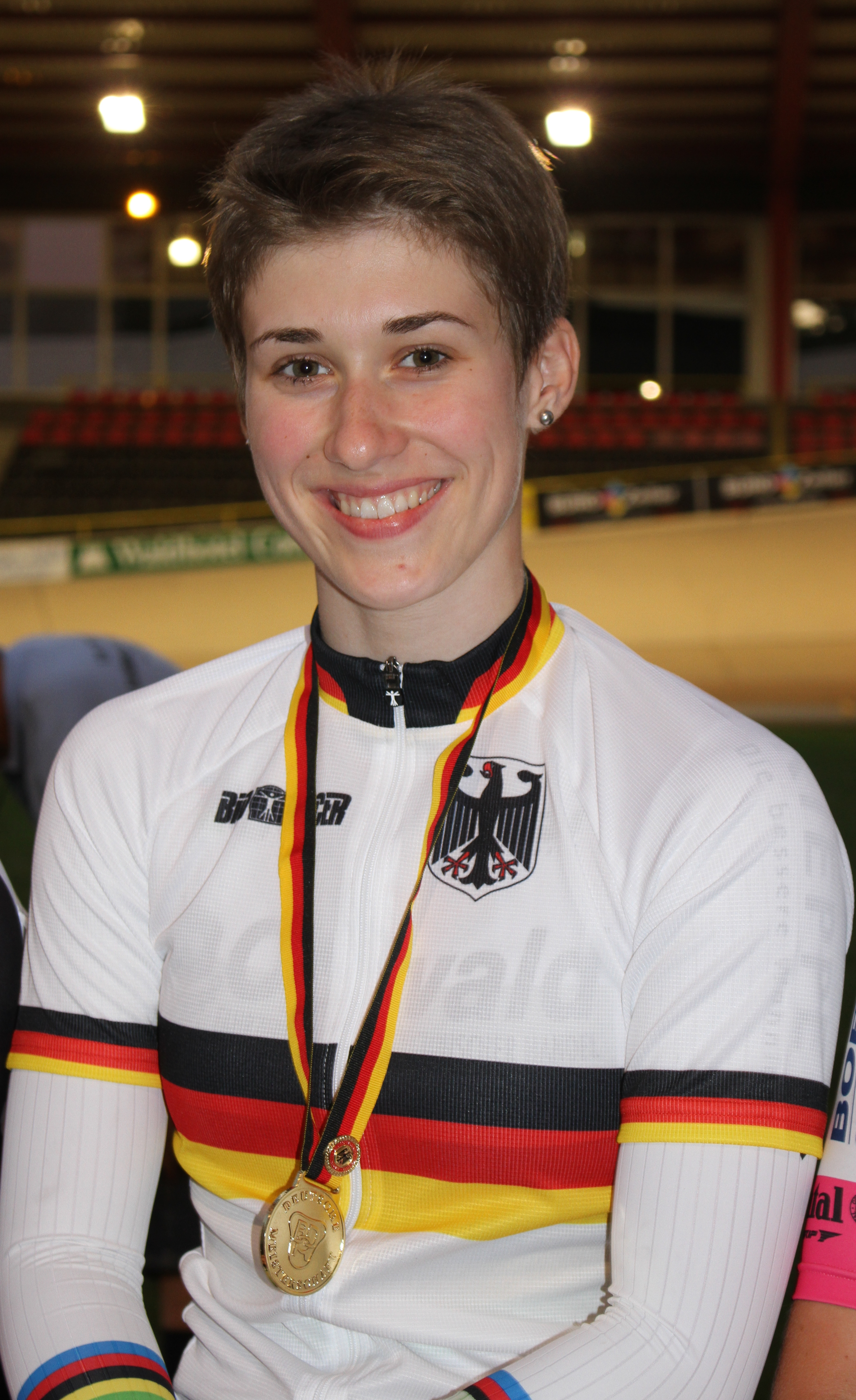 Pauline Grabosch, deutsche Radsportlerin